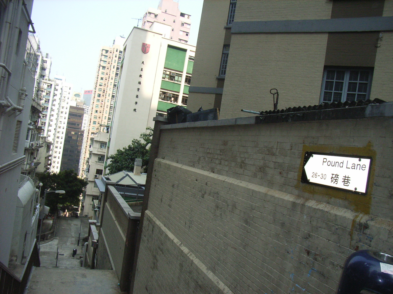 Pound Lane, Sheung Wan, Hong Kong - by Papa mimi